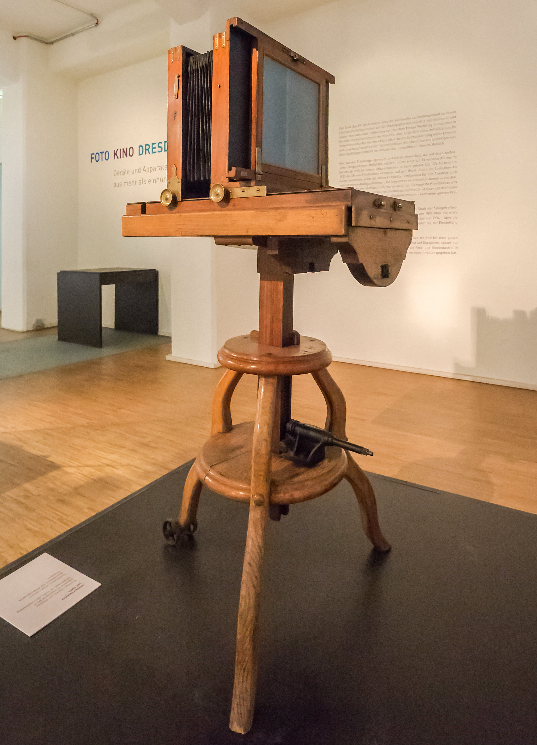 Atelierkamera um 1895 1